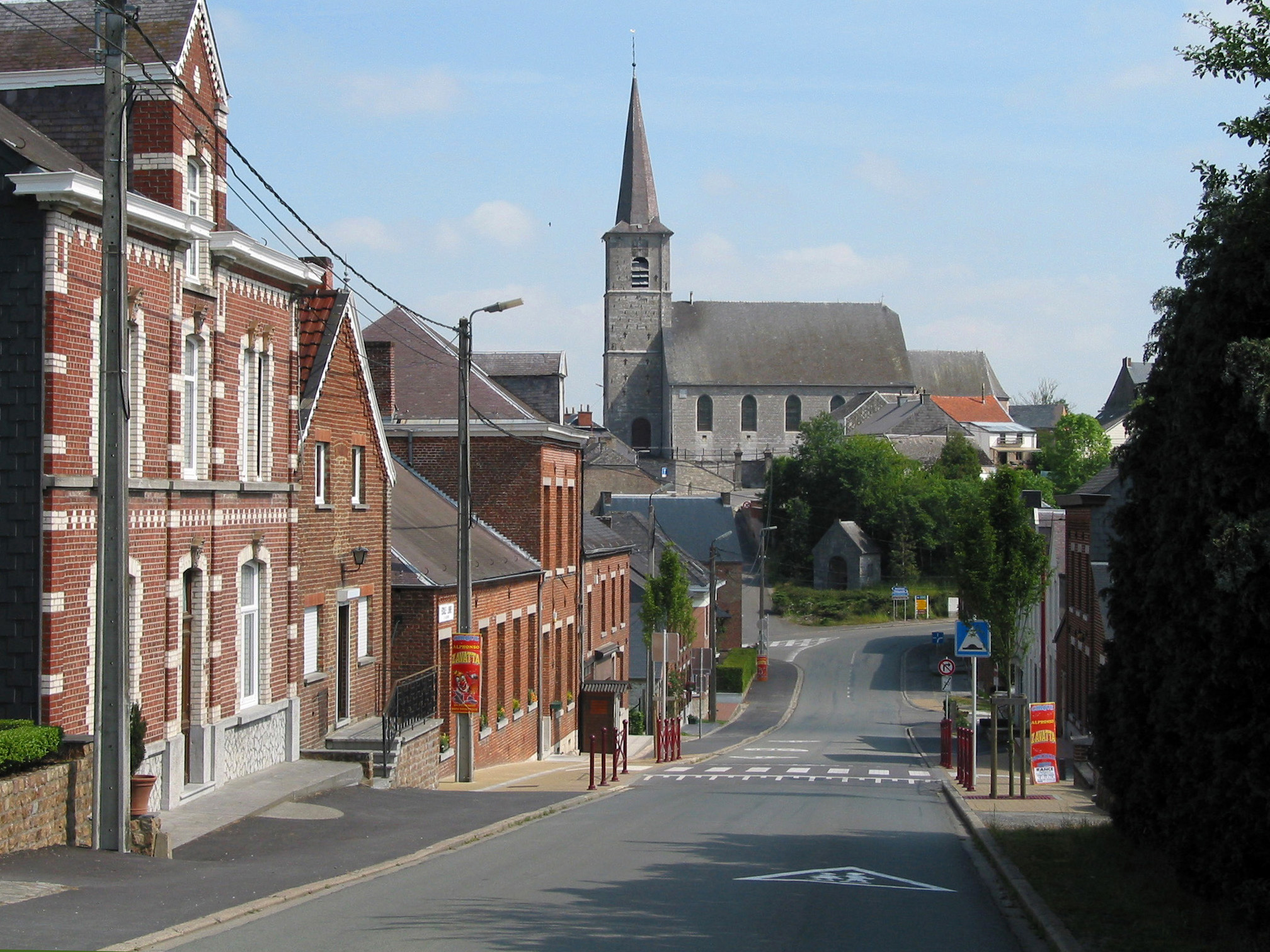 Froidchapelle (Belgique) - Rue de la Station.